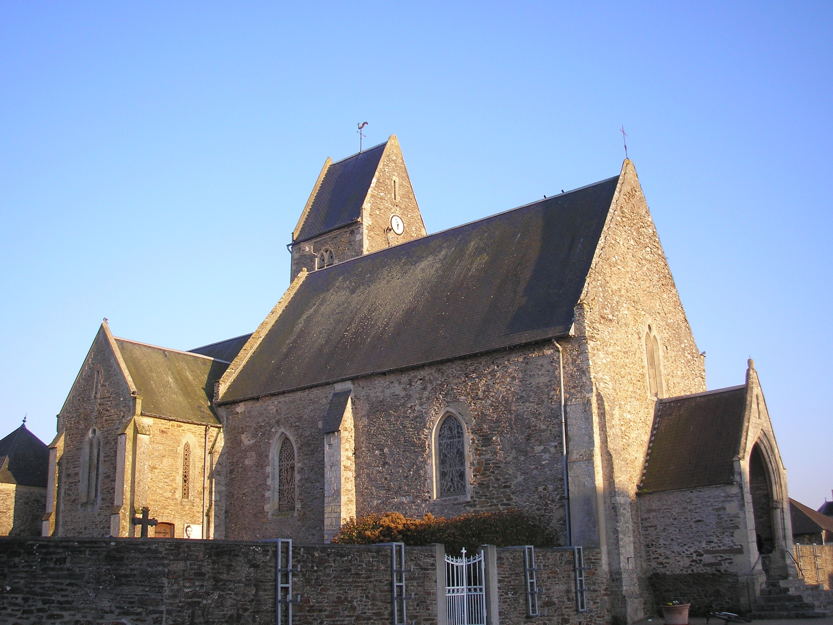 Saint-Clair-sur-l'Elle (Normandie, France). L'église Saint-Clair.